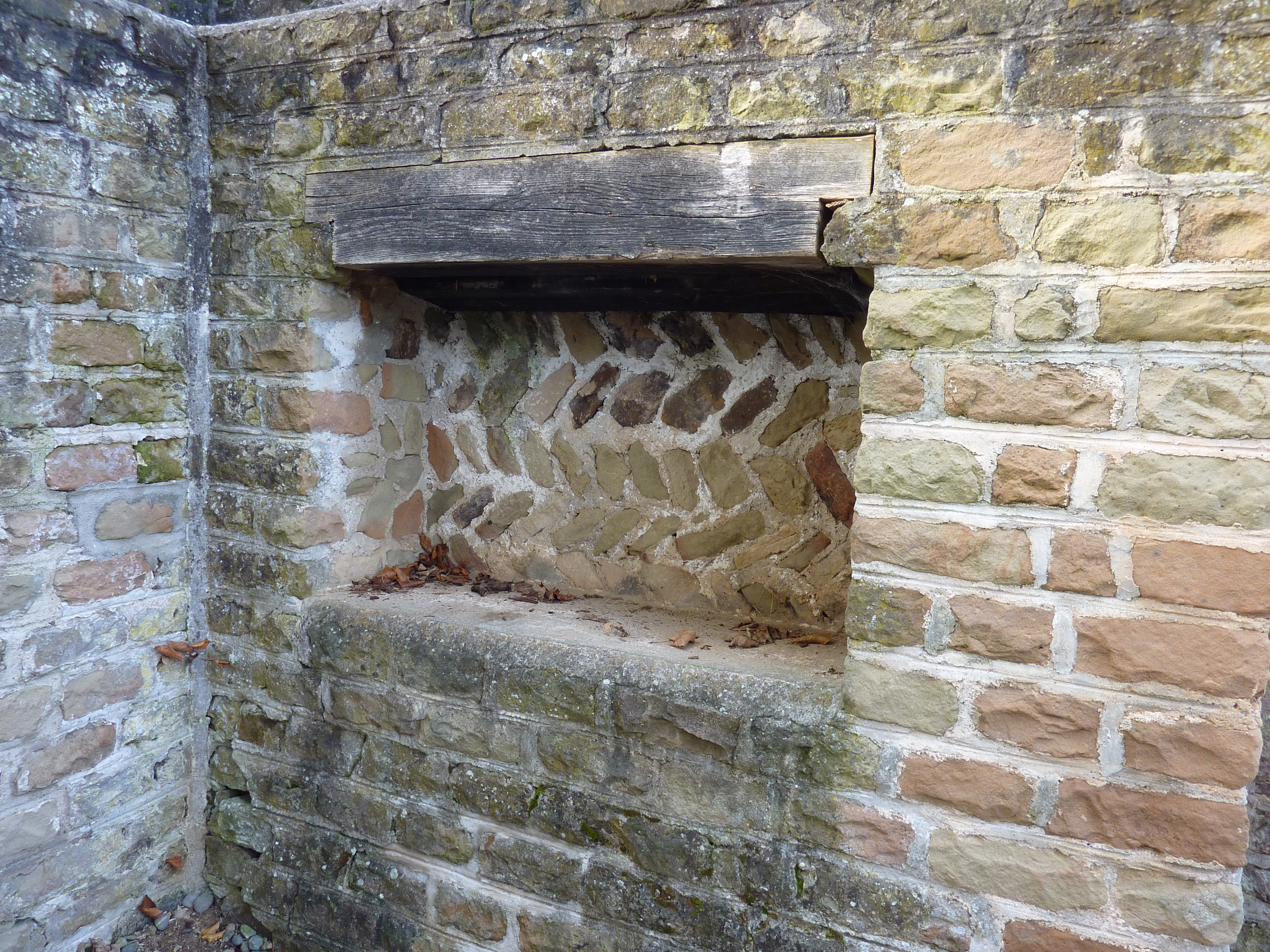 Mauernische der Villa rustica in Rommelshausen